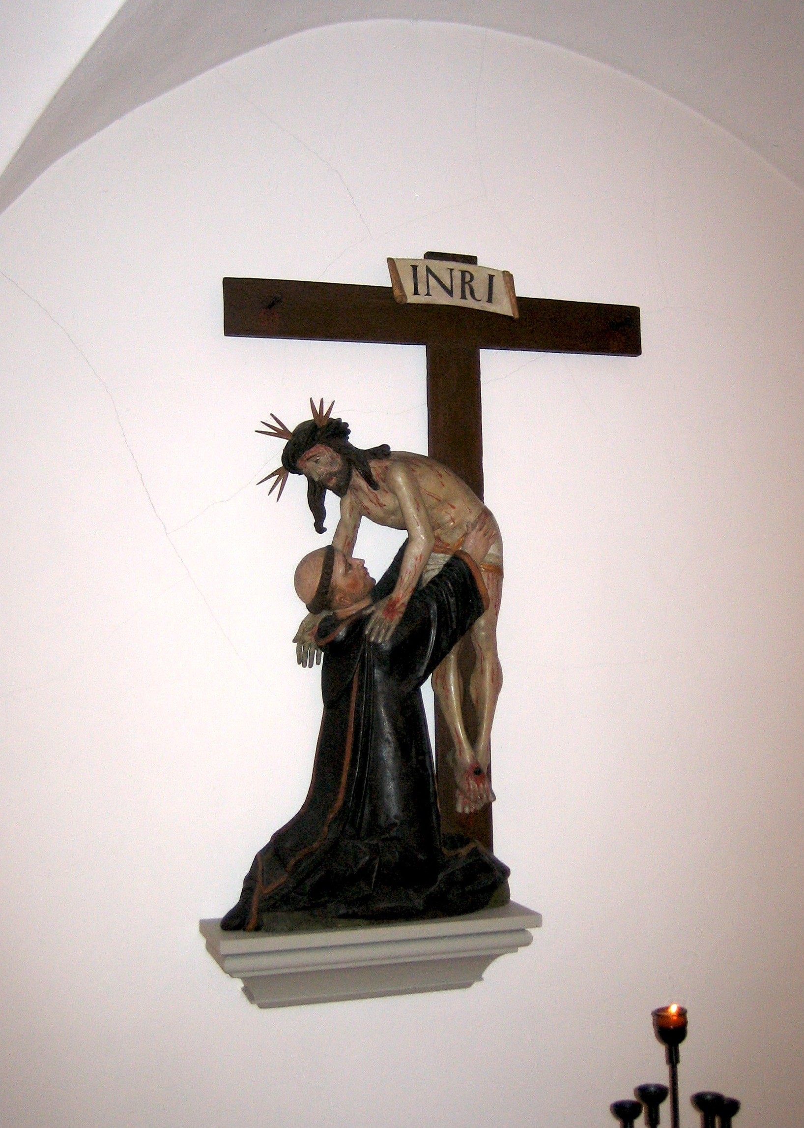 Kloster Wurmsbach: Holzplastik aus der 2. Hälfte des 16. Jhd: Vision des hl. Bernhard von Clairvaux